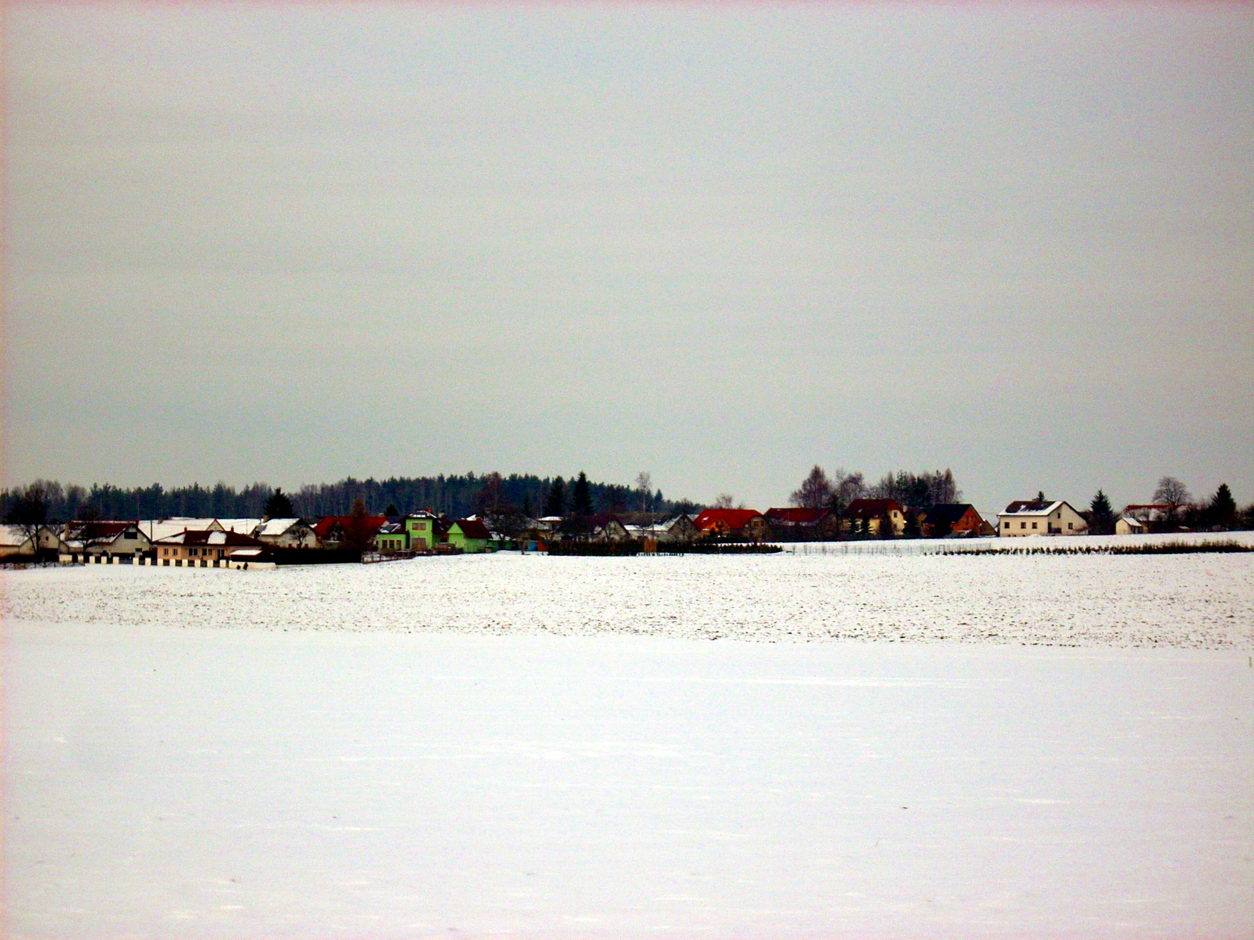 Filipovské Chaloupky